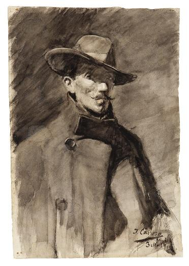 Autorretrato.